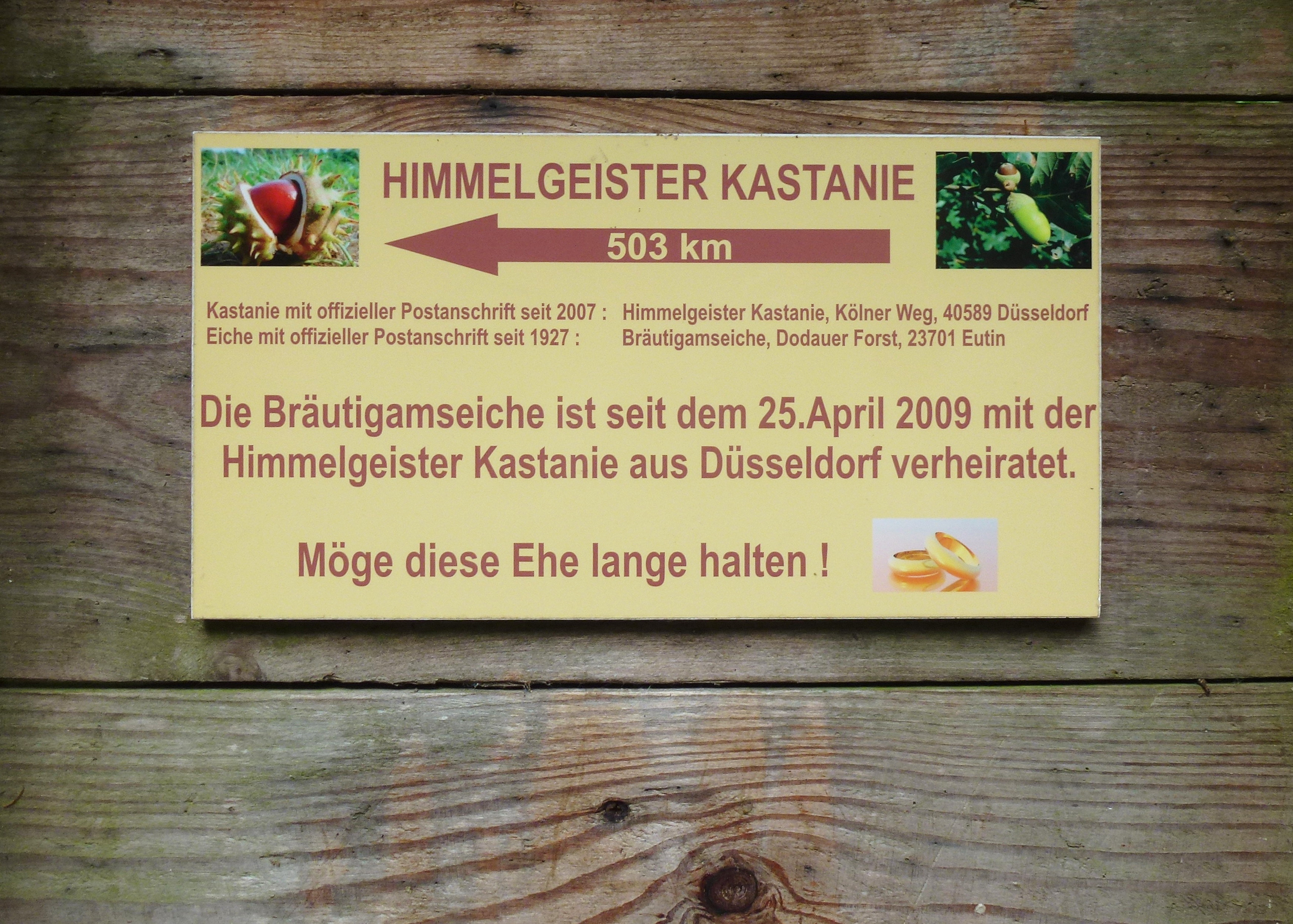 Die Bräutigamseiche im Dodauer Forst bei Eutin in Schleswig-Holstein.